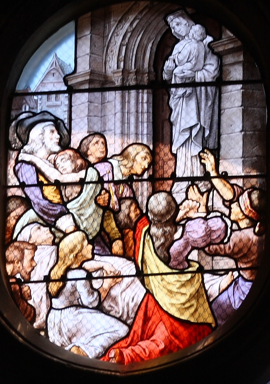 Bleiglasfenster (Ausschnitt) in der katholischen Kirche Notre-Dame in Pontoise, Darstellung: ?